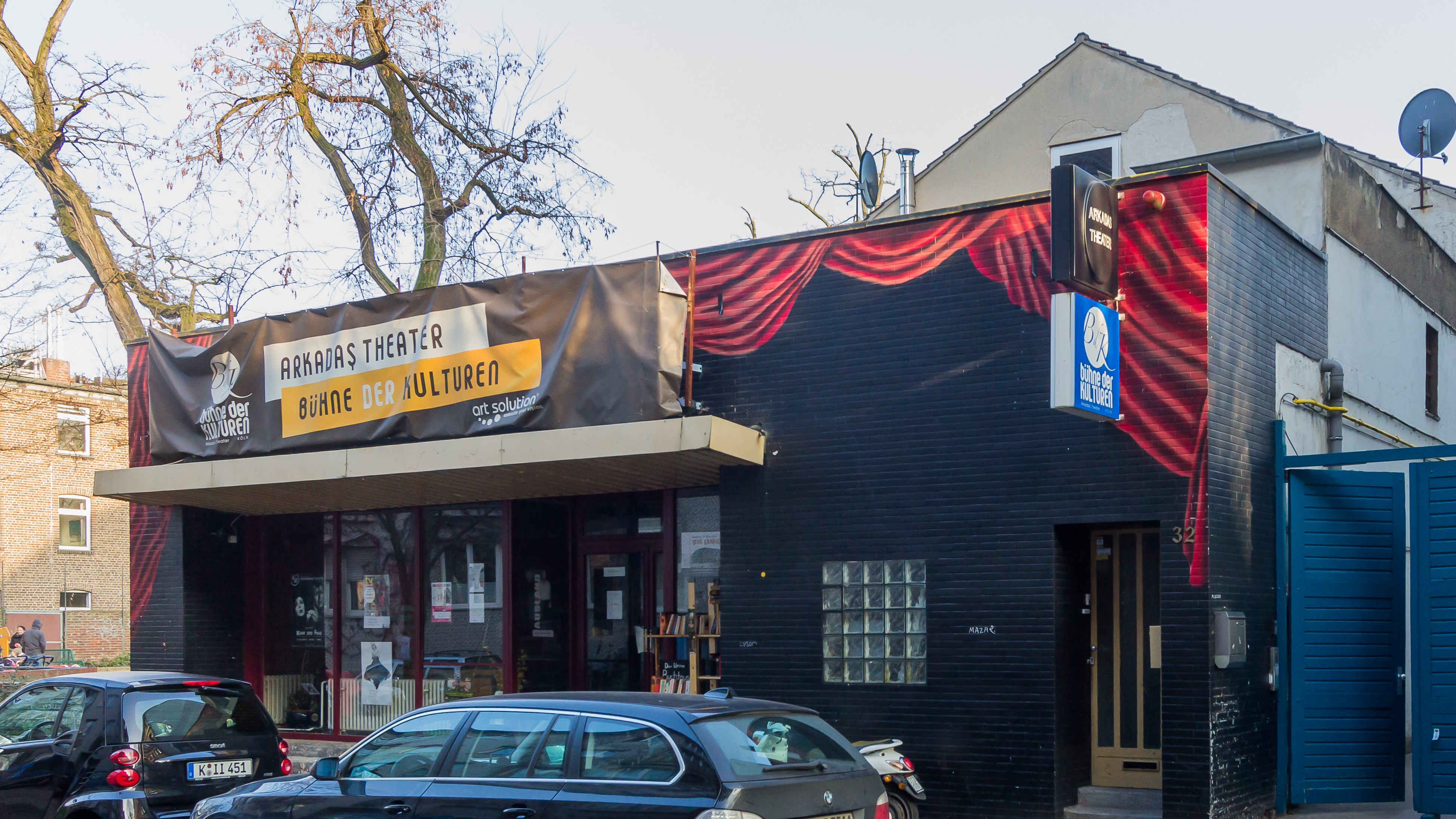 Arkadas Theater-Bühne der Kulturen (auch Arkadaş Theater), Köln. Seit Anfang 2016 heißt das Theater „Bühne der Kulturen“